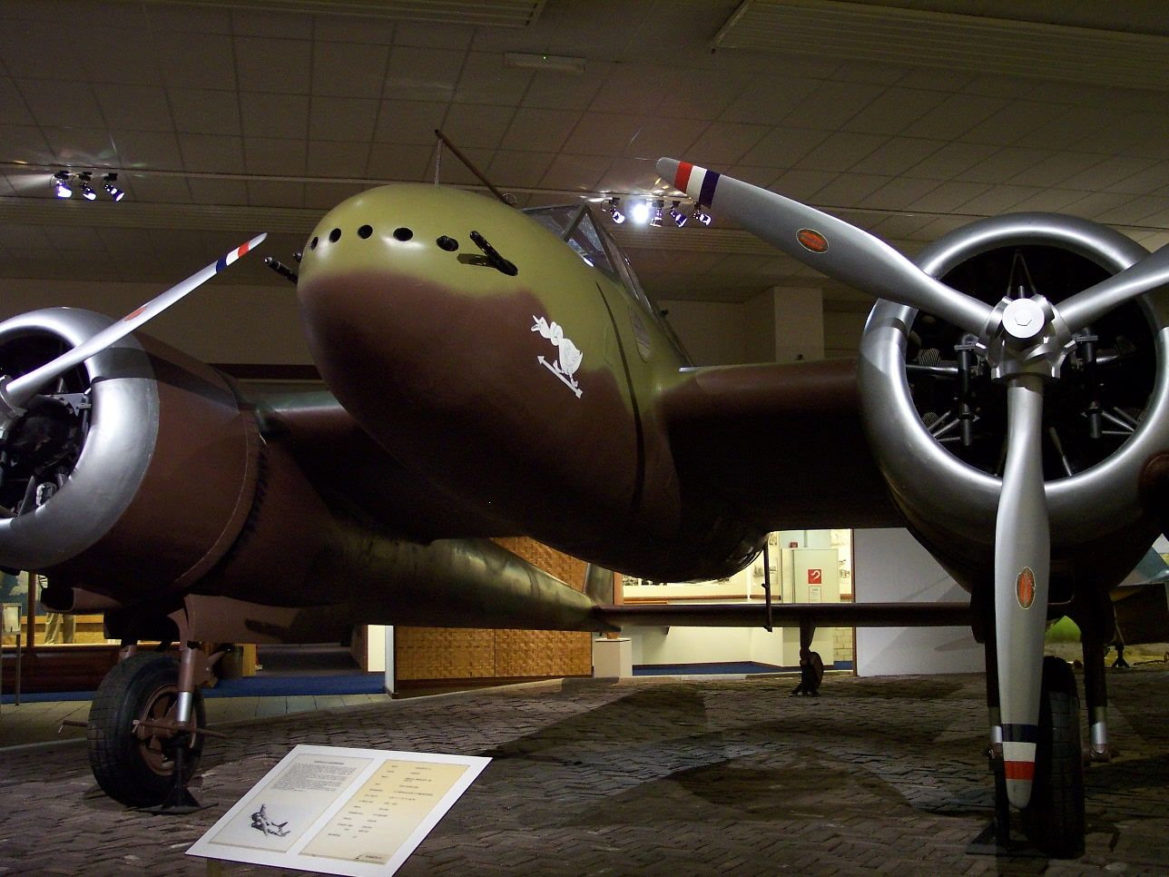 Fokker G.1A Replica in Soesterberg